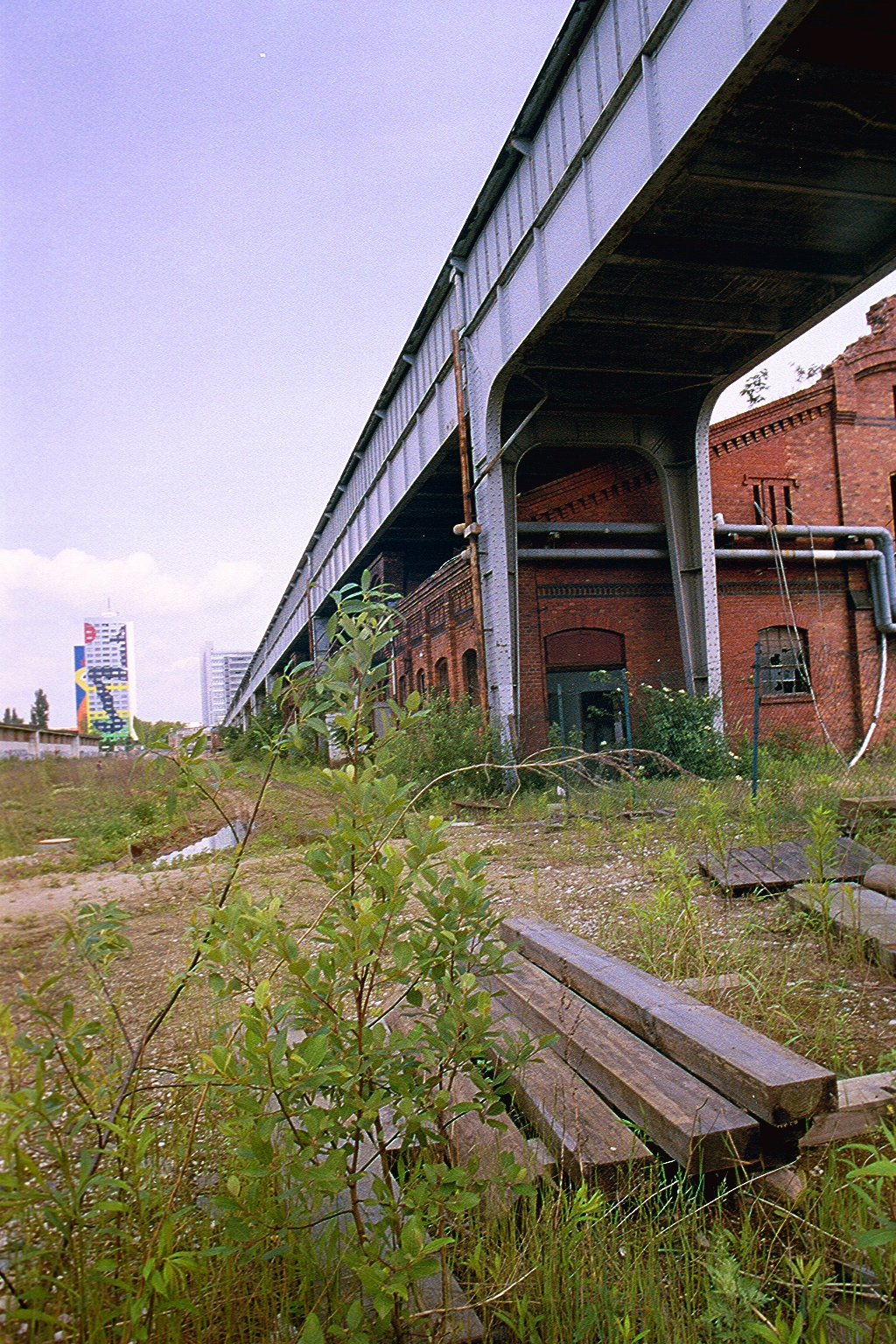 Berlin, Langer Jammer, Fußgängerbrücke Storkower Straße, Blickrichtung gen Storkower Straße. Fotografenstandpunkt: Eldenaer Straße, etwas westlich des ehemaligen Treppenaufgangs gegenüber dem Forckenbeckplatz